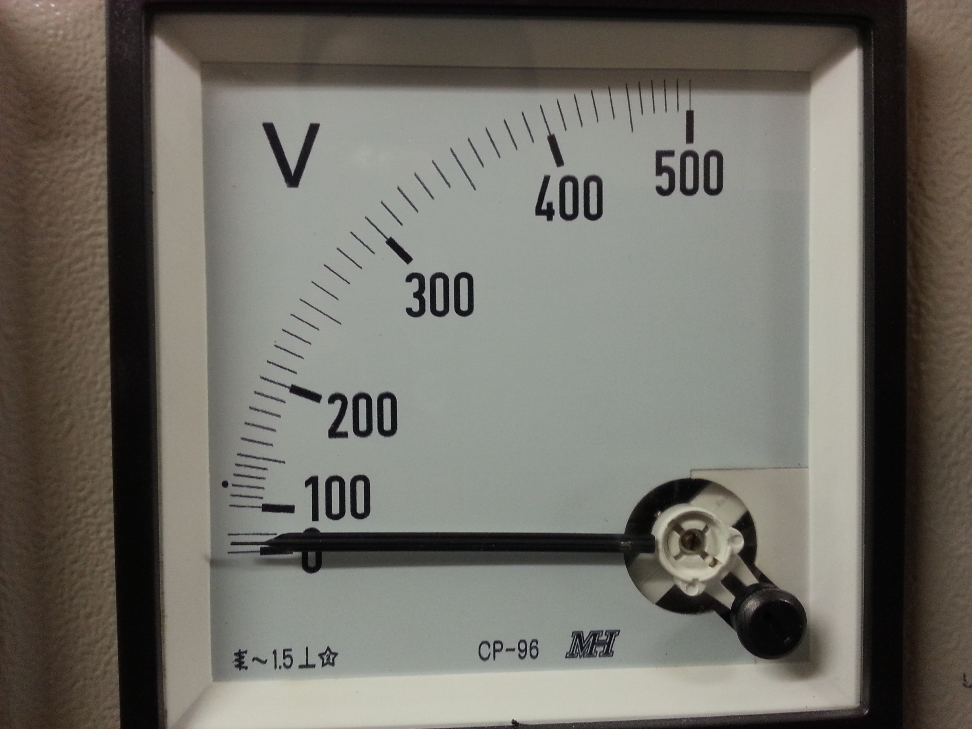 voltmeter to measure voltage